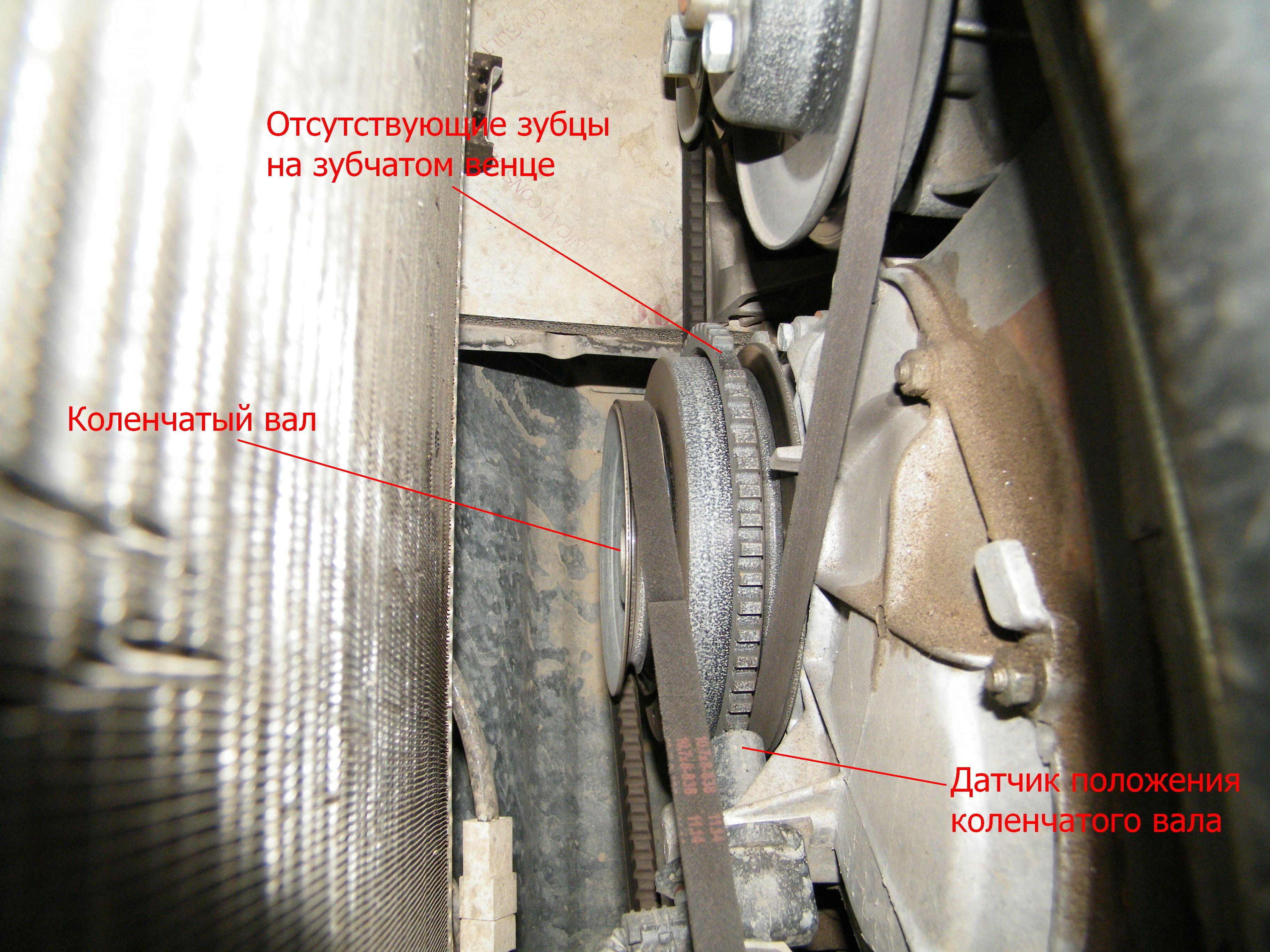 Датчик положения коленчатого вала